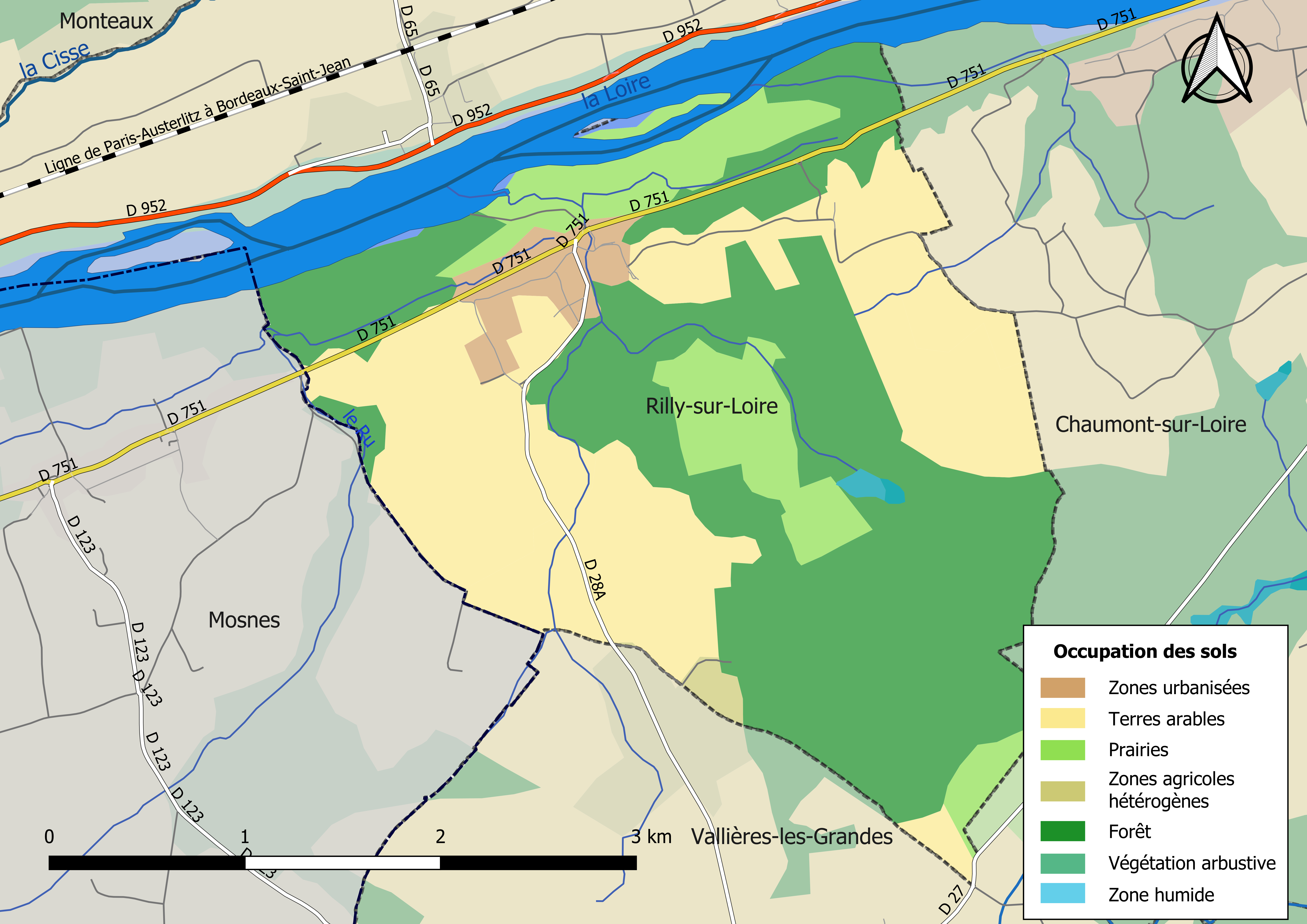 Carte des infrastructures et de l’occupation des sols en 2018 de la commune de Rilly-sur-Loire (France).